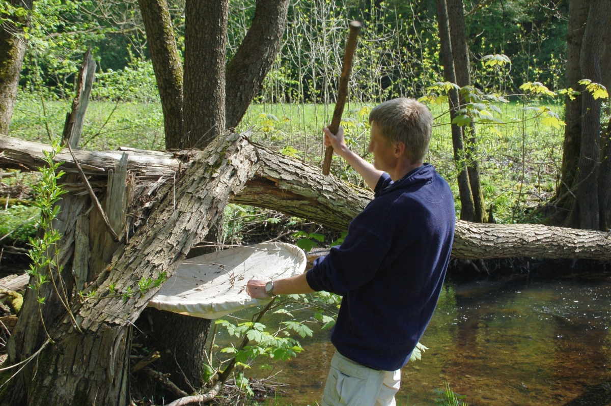 Klopfschirm zum Fang von Tieren im Einsatz, Steinau bei Schlüchtern, Main-Kinzig-Kreis, Hessen, Deutschland